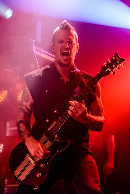 Dan Donegan en 2016